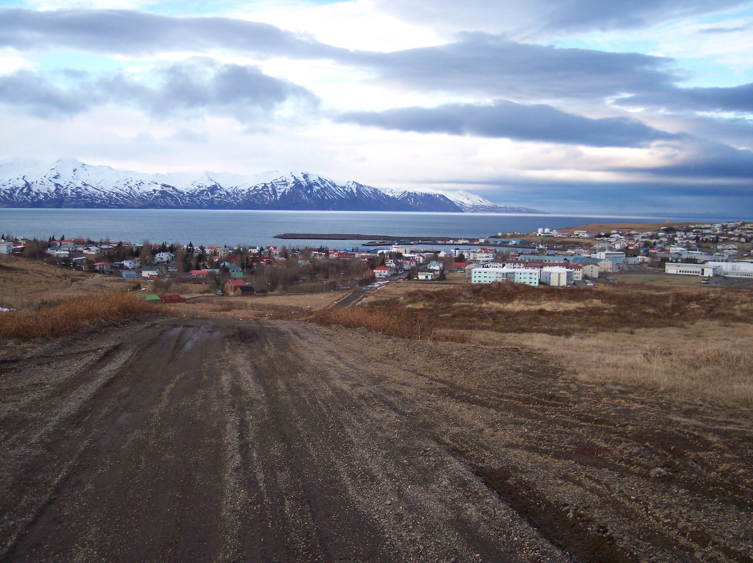 Lýsing Húsavík, Iceland Photo by Adalbjorg Kristbjornsdottir Februar 2006